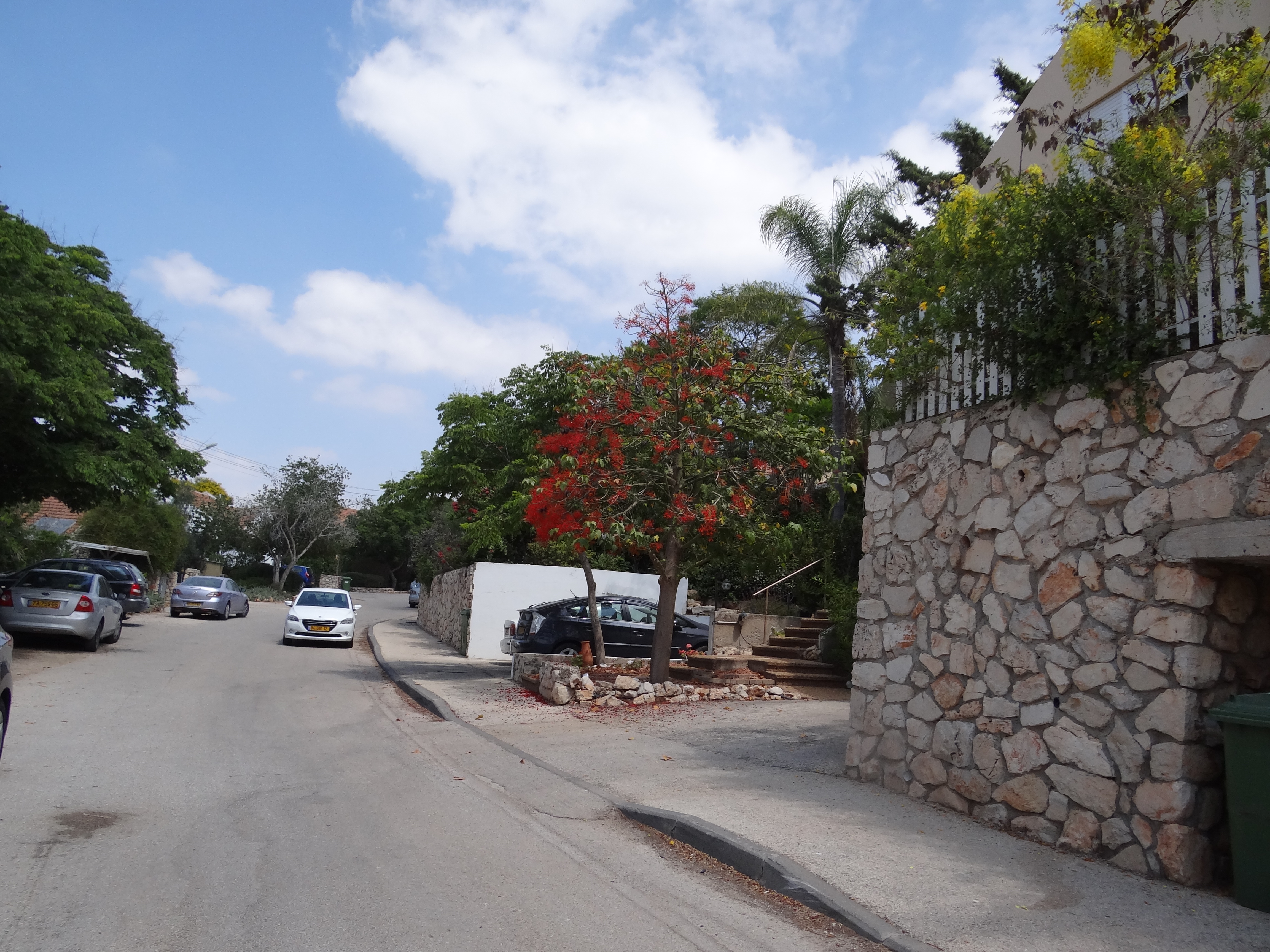 הושעיה הוא יישוב קהילתי דתי בגליל התחתון, 6 ק"מ צפונית לנצרת, בתחום השיפוט של המועצה האזורית עמק יזרעאל.